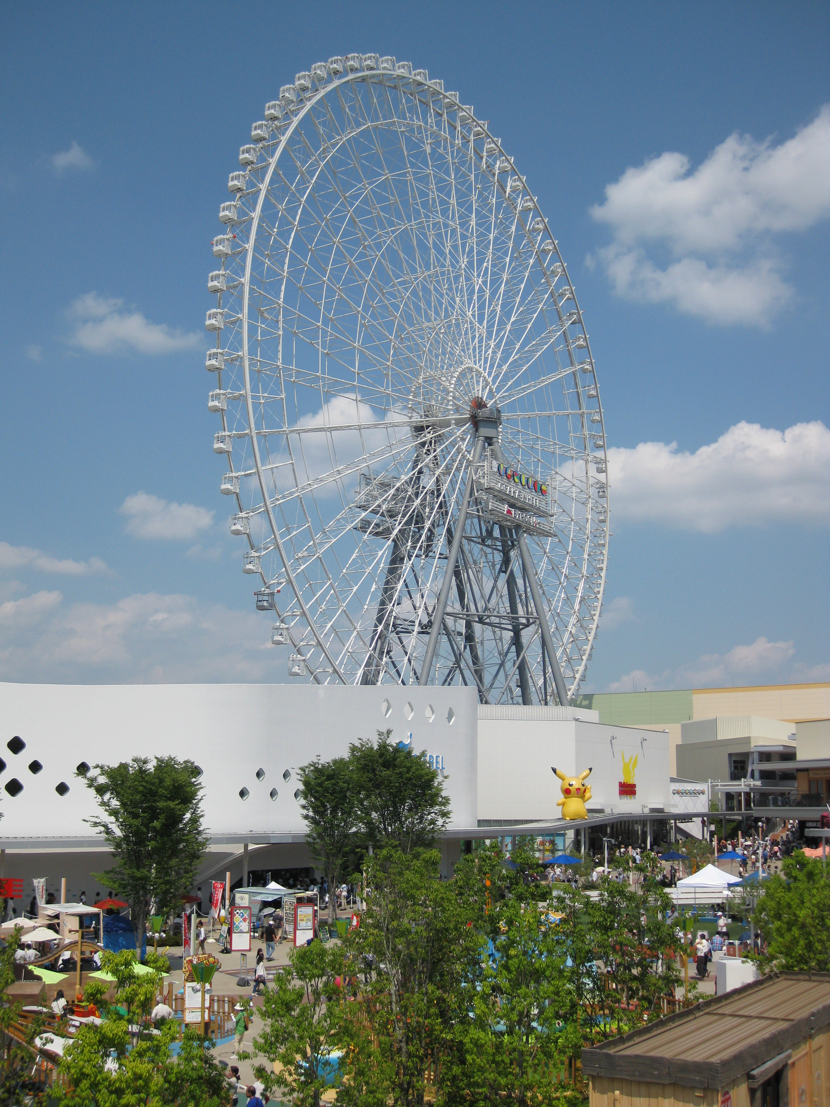 万博記念公園にオープンした日本最大の観覧車、OSAKA WHEEL。